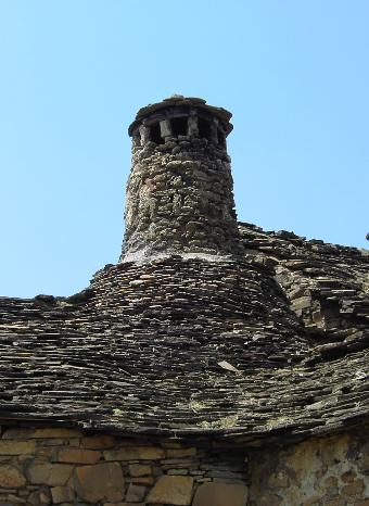 Una chimenea (chaminera) típica de la comarca Oscense de Sobrarbe.